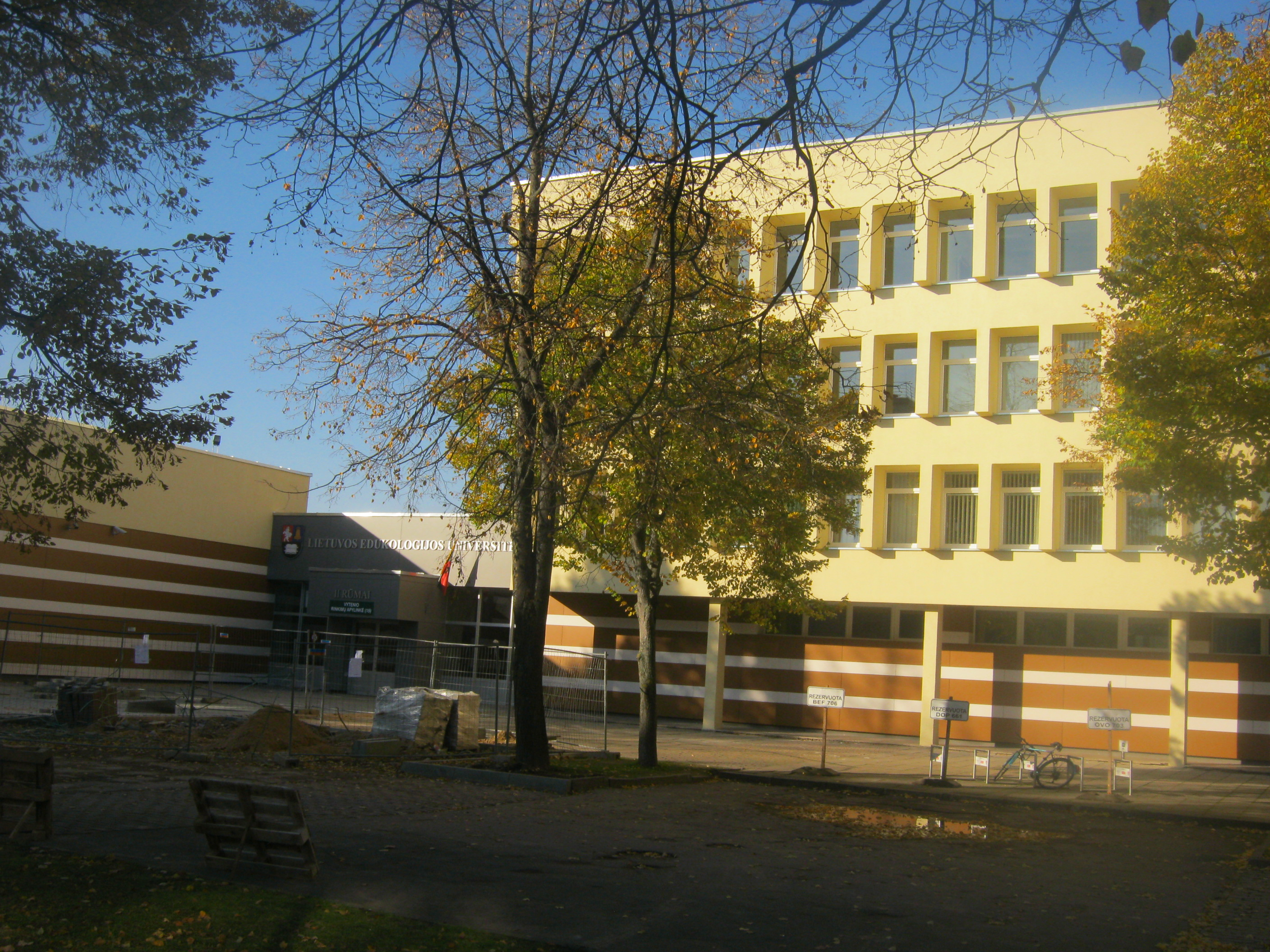 LEU 2-ieji rūmai Ševčenkos g.